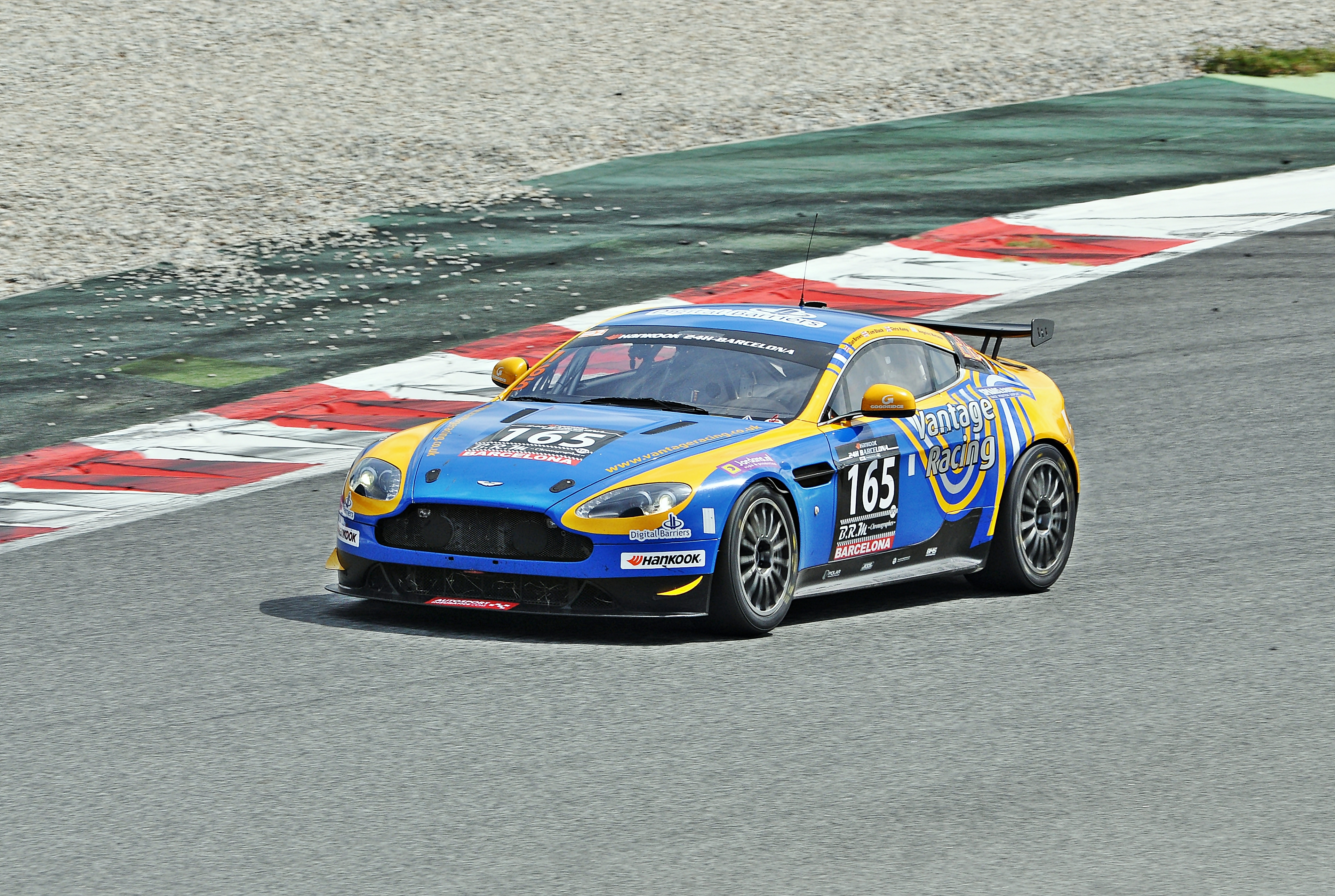 24 horas de Barcelona-2015-circuito de cataluña